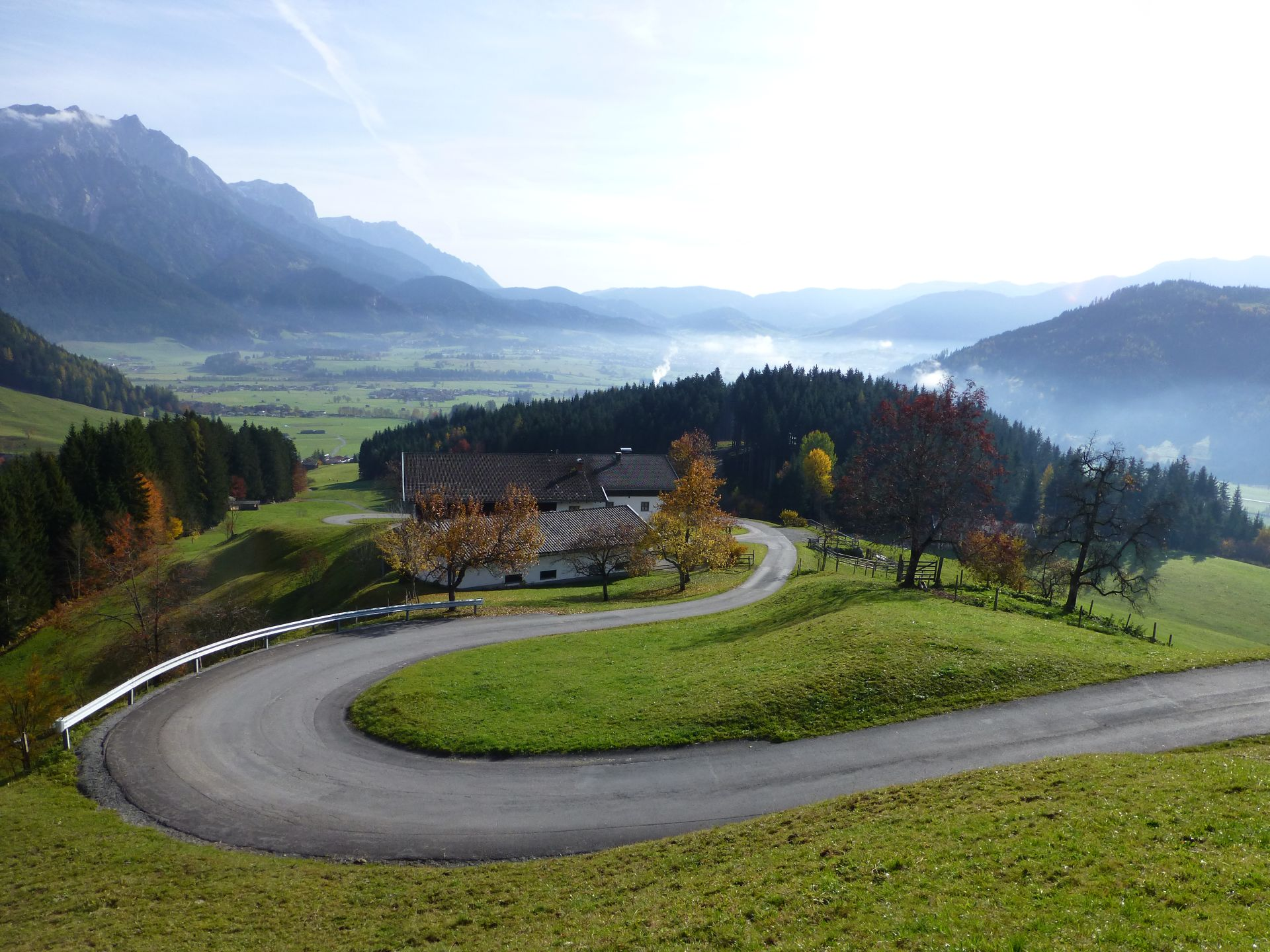 Blick von Ullach, Leogang, über das Saalfeldener Becken